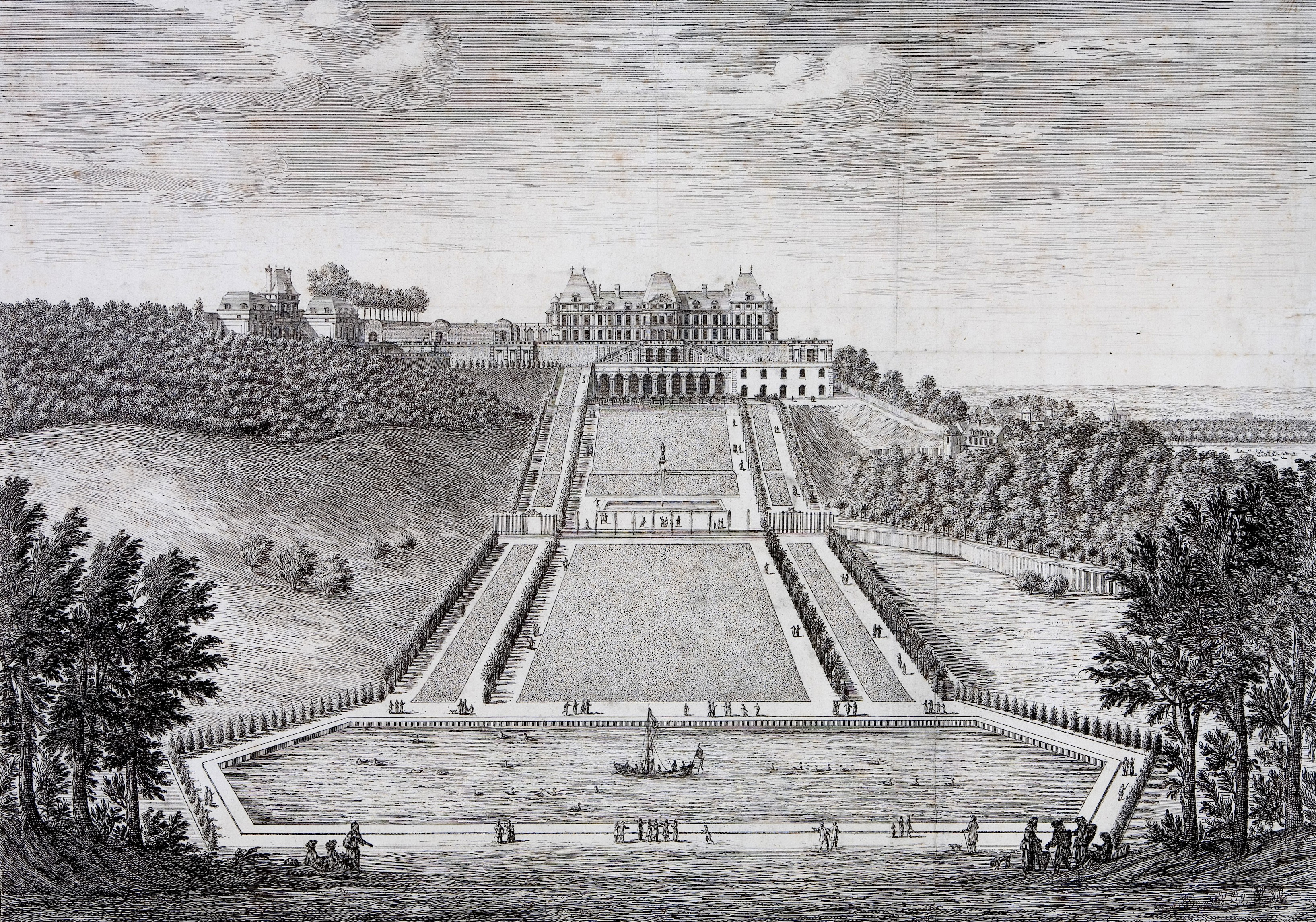 Veue du château de Meudon du côté du jardin appartenant à Monseigneur le marquis de Louvois. Gravure par Israel Silvestre. Vue prise du bassin de Chalais vers 1685.